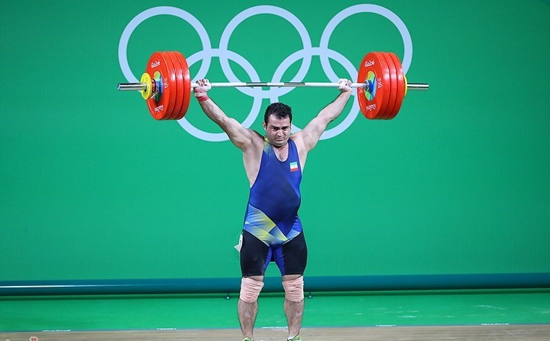 وزنه‌برداری در بازی‌های المپیک تابستانی ۲۰۱۶ – ۹۴ کیلوگرم مردان